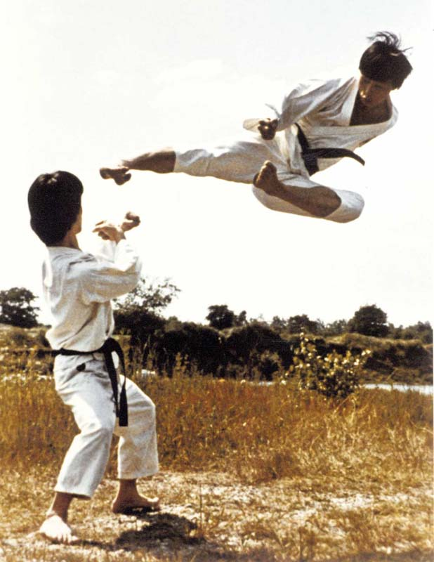 Tymyo Yop Chagi, gesprungener Seitwaerts-Fussstoss von Shin boo-Young 1978